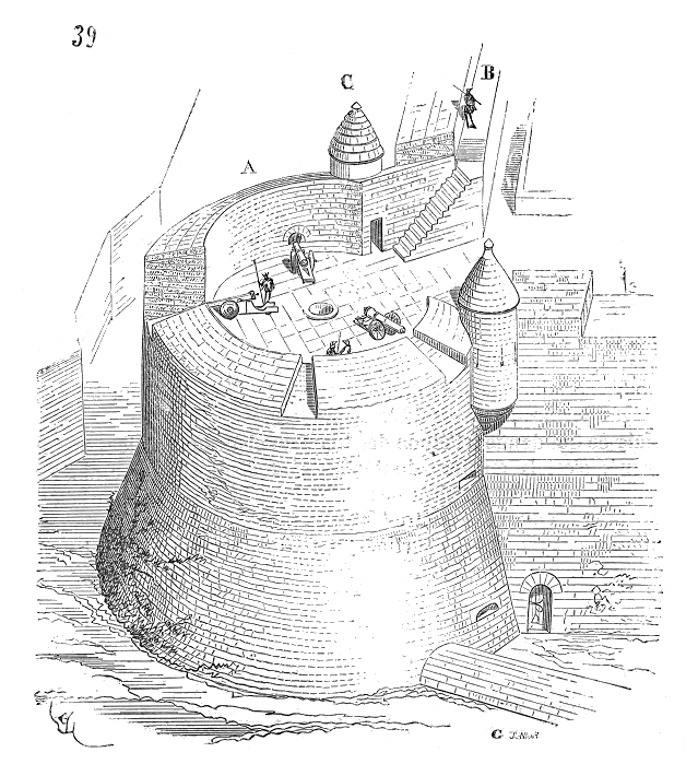 ... Mais ce qui donne à l'étude des tours du château de Salces un intérêt marqué, c'est la manière dont elles sont disposées pour abriter les défenseurs. En effet, la place de Salces, barrant la route entre l'étang de Leucate et les derniers contre-forts des Corbières, est dominée par ces hauteurs. Les tours, les courtines, les demi-lunes sont soumises à des vues de revers et d'enfilade. C'est en exhaussant les parapets des tours du côté dangereux et en établissant à la gorge des tours opposées des parados,que l'ingénieur a couvert les plates-formes. L'exhaussement des parapets du côté de la montagne met les embrasures à couvert, tandis que celles du côté opposé sont à ciel ouvert. La figure 39 présente à vol d'oiseau la perspective d'une de ces tours. On voit en A le parapet exhaussé défilant les canonniers et les pièces placés sur la plate-forme, ainsi que le ferait un cavalier ou une traverse. Les courtines, construites seulement pour de la mousqueterie, ne sont pas munies d'embrasures, mais possèdent une banquette B et relèvent leurs parapets en face des terrains élevés qui ont des vues sur le château. Des échauguettes C occupent les angles rentrants des tours avec les courtines, et peuvent recevoir des arquebusiers dont le tir flanque les escarpes. De plus, de petites pièces placées dans des étages voûtés et suffisamment aérés enfilent les fossés à la base et vers le sommet des talus des tours ...